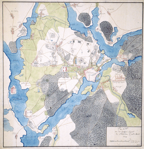 Bildunterschrift: Plan von der Gantzen Gegent bey Potsdam d[en] 28ten April 1773. Von M. H. M. Handzeichnung koloriert. 54 x 55 cm (Blattgröße).